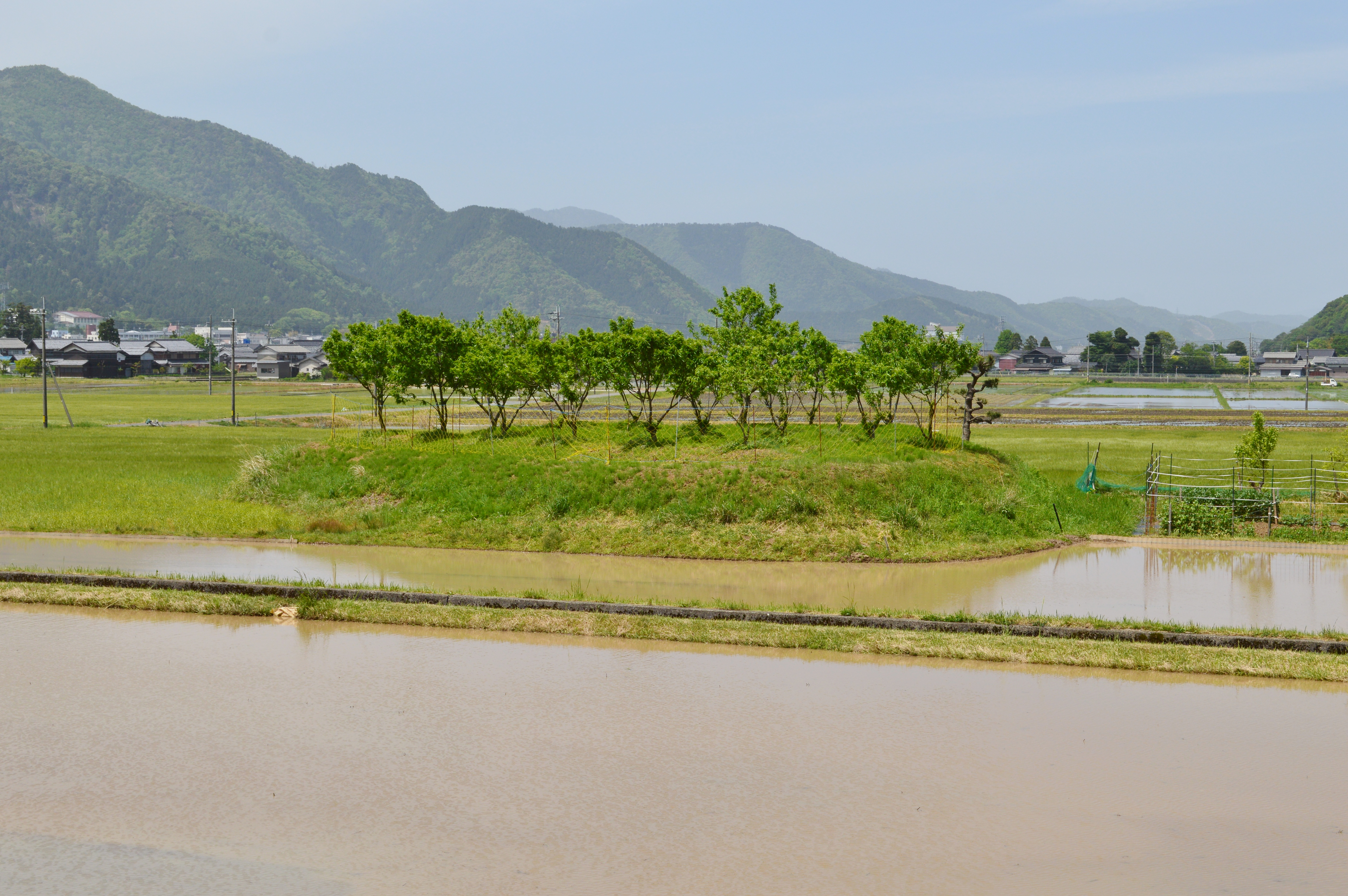 糠塚古墳 (若狭町) 墳丘全景